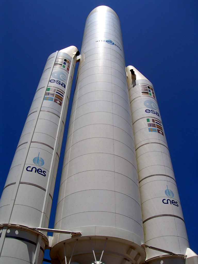 Ariane 5